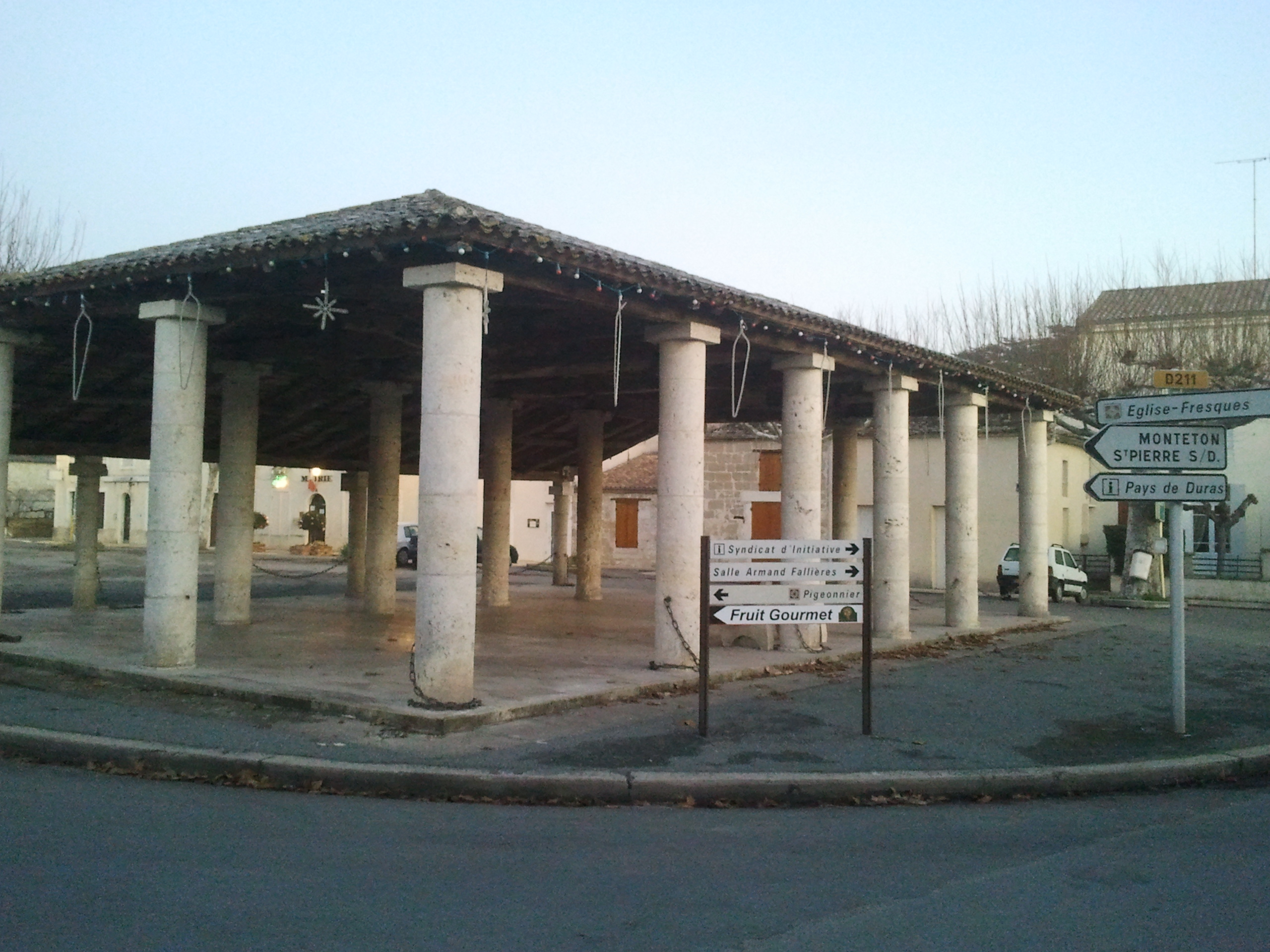 Mairie d'Allemans-du-Dropt